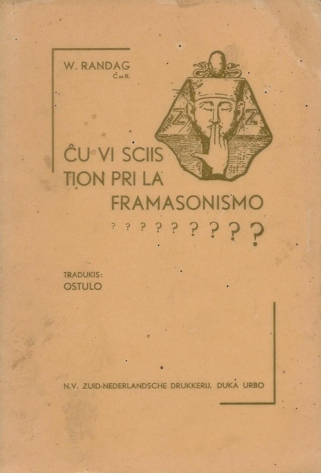 Librokovrilo de "Cxu Vi Sciis tion pri la Framasonismo?",1937